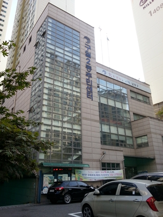 구월2동주민센터